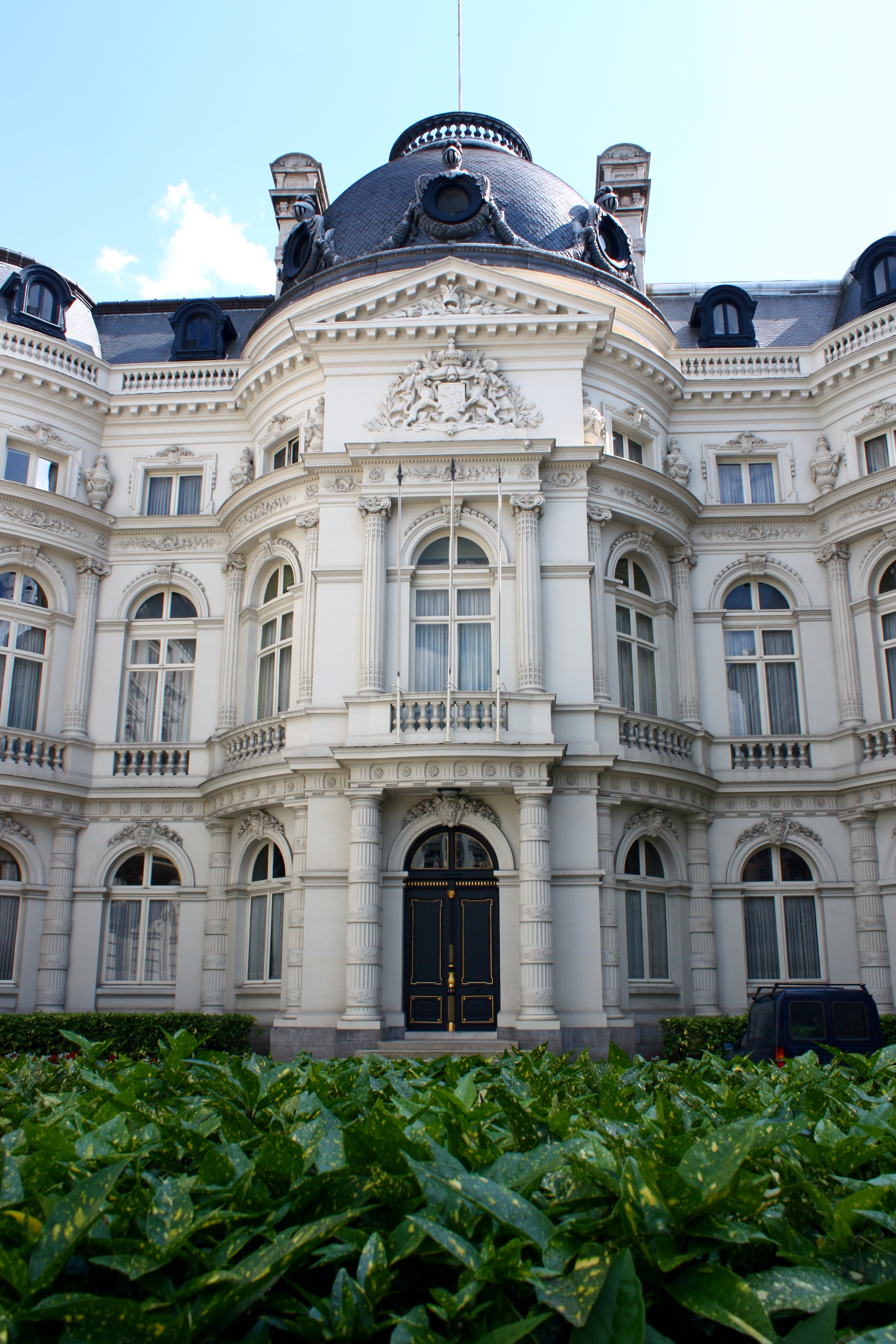 Ancien Palais du Comte de Flandre - Cour des comptes. Construit en 1776-1781 par Barnabé Guimard. (Style: Classicisme) Monument classé n°2043-0566/0